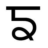 нганга